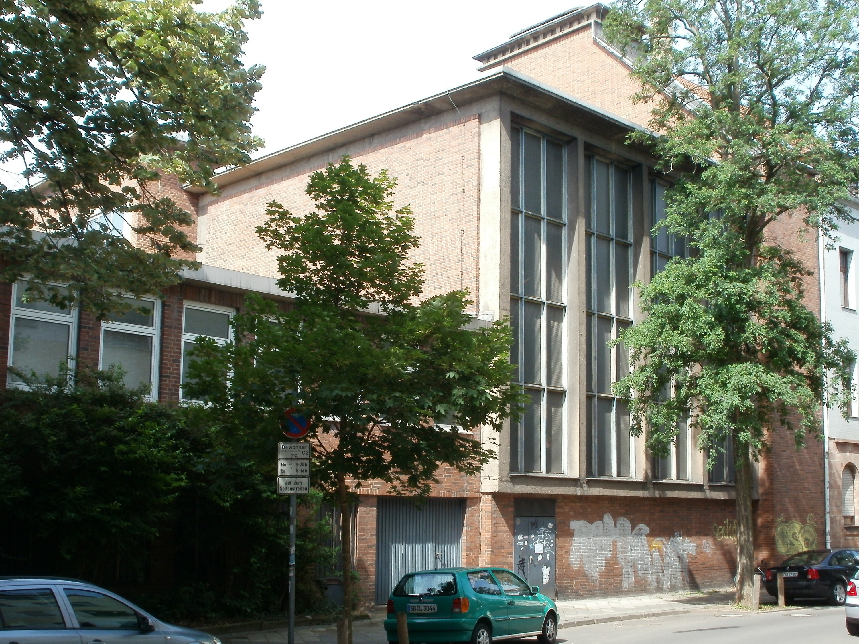 Stadtbad St. Johann (Saarbrücken)